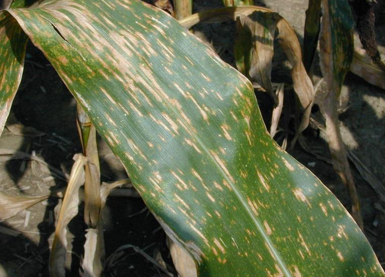 Synptômes foliaires de la cercopsoriose du maïs (Cercospora zeae-maydis)